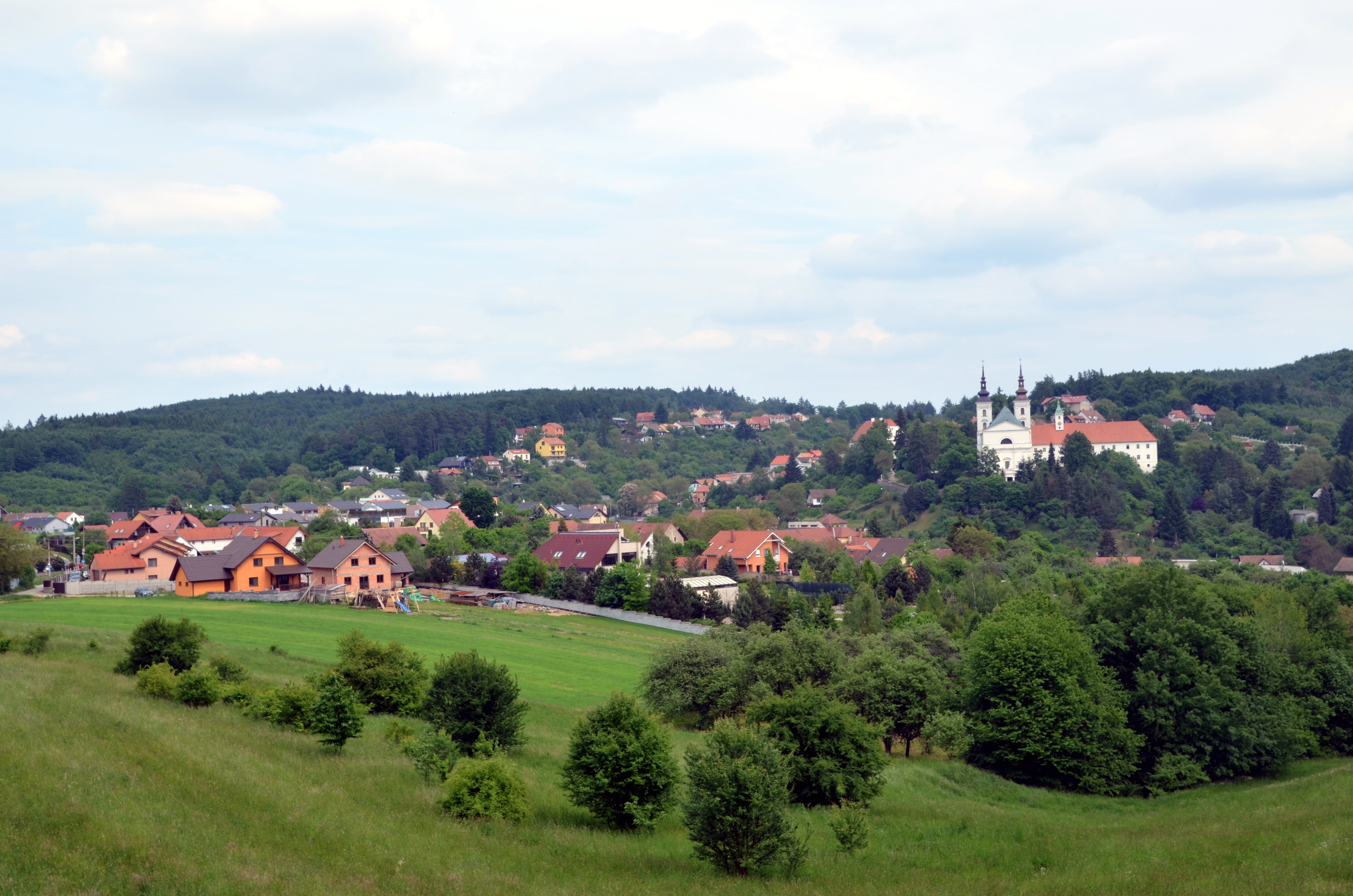 Obec Vranov fotografovaná ze západu